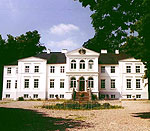 Gut Rosenkrantz in Schinkel bei Gettorf, Schleswig-Holstein, seit 1828 im Besitz der Familien von Rosenkrantz und von Münchhausen